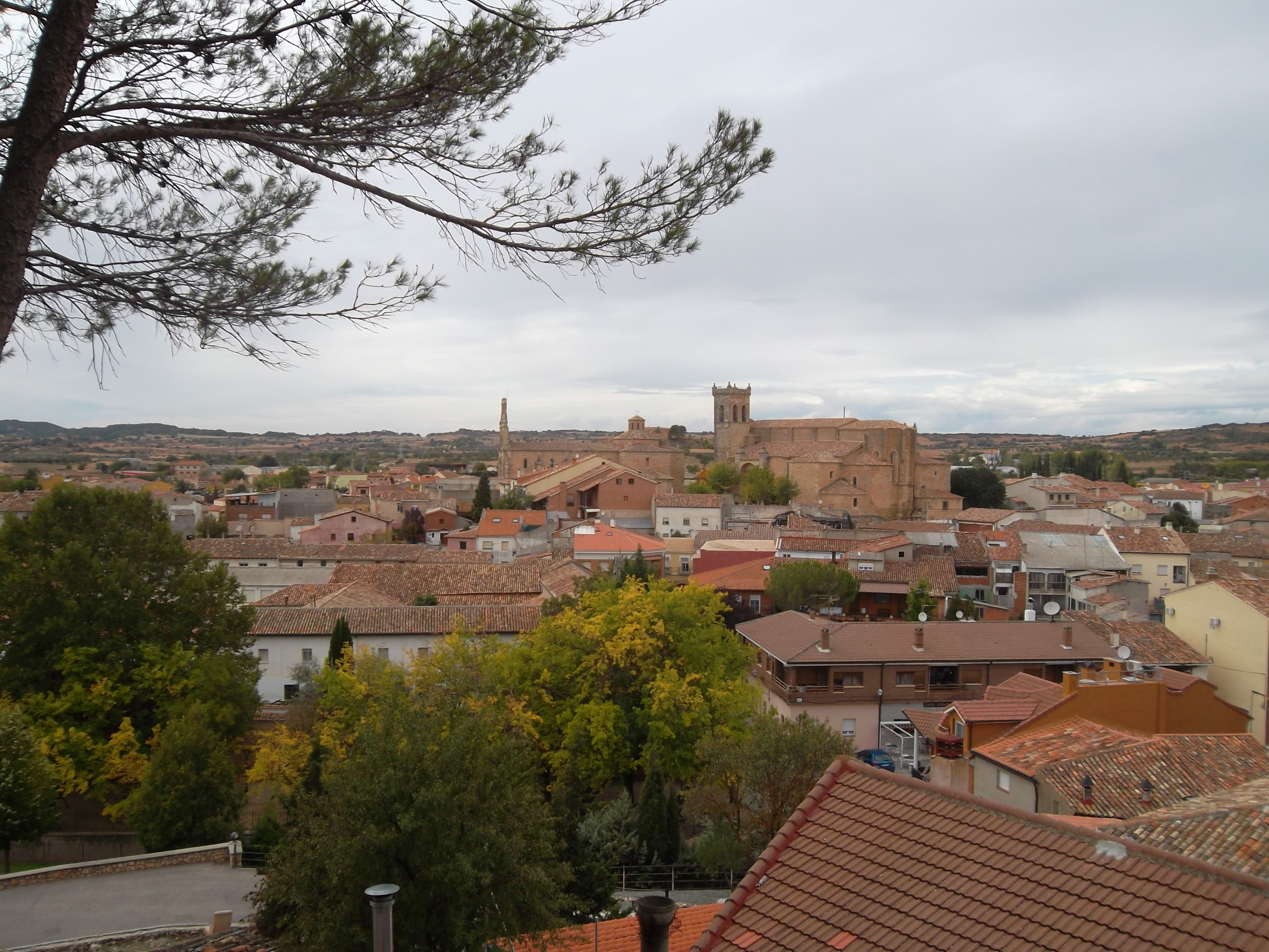 Vista general de Cifuentes